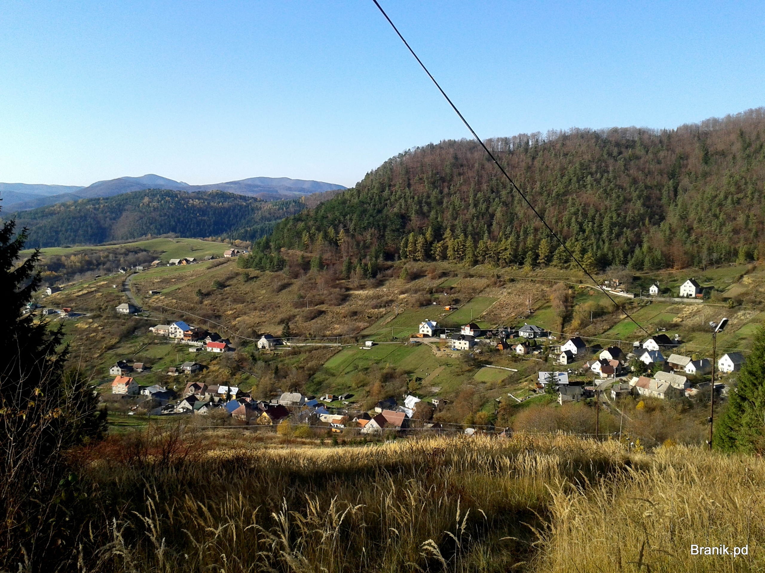 972 29 Čavoj, Slovakia